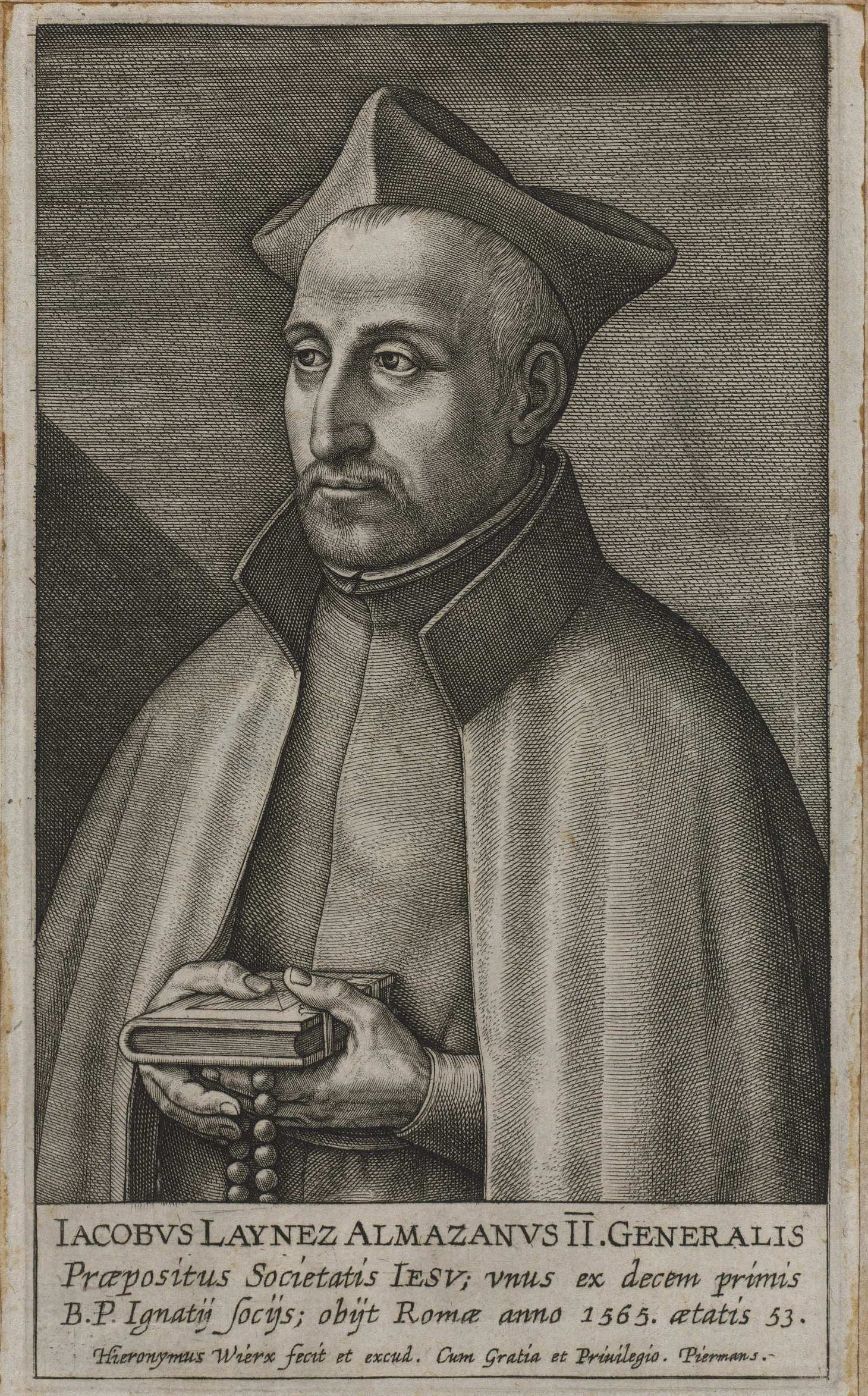 Diego Laínez, grabado de Hieronymus Wierix recogido en EFFIGIES PRAEPOSITORUM GENERALIUM SOCIETATIS IESV. Hieronymus Wierix fecit et excudit